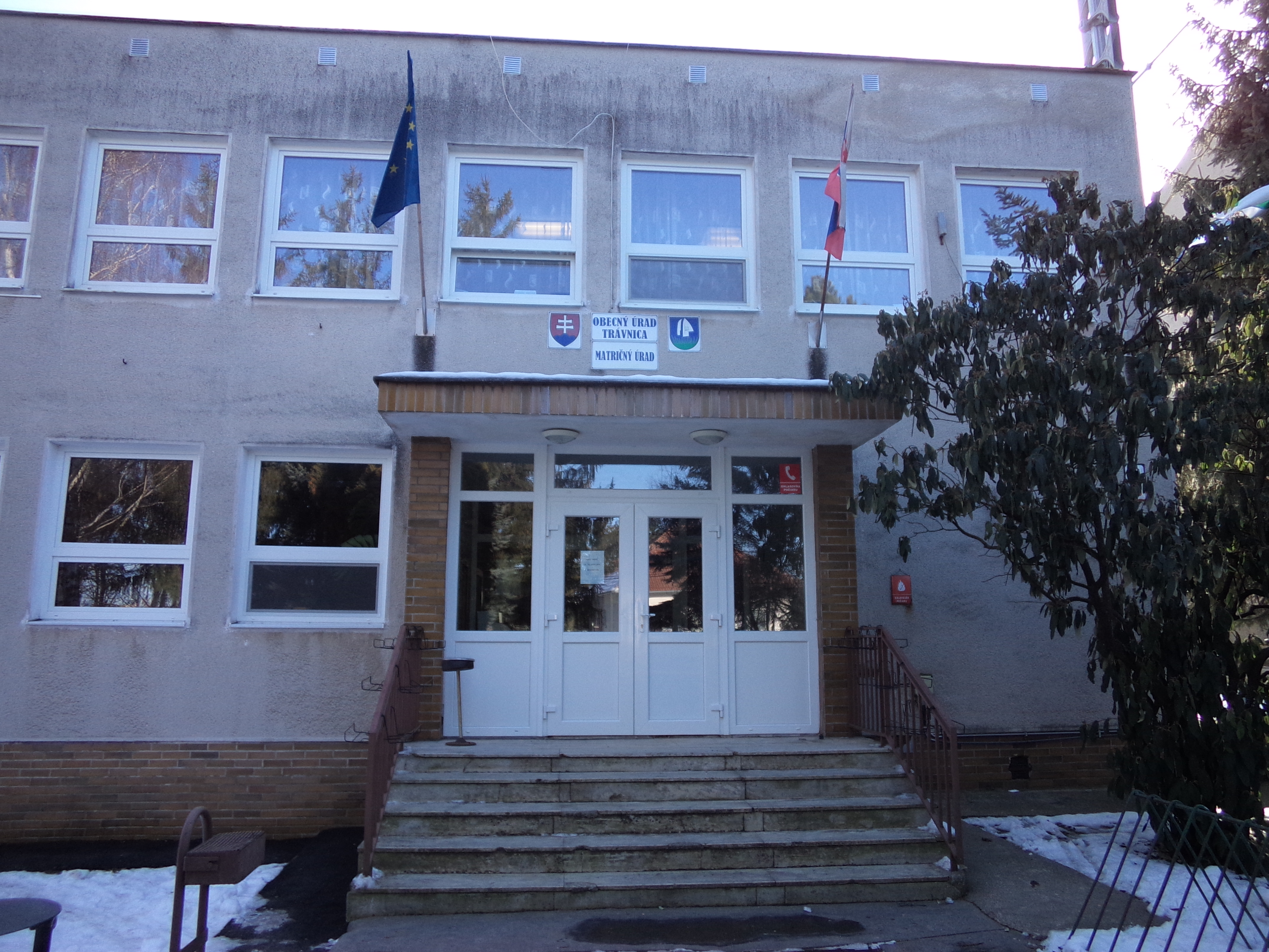 Barsfüss